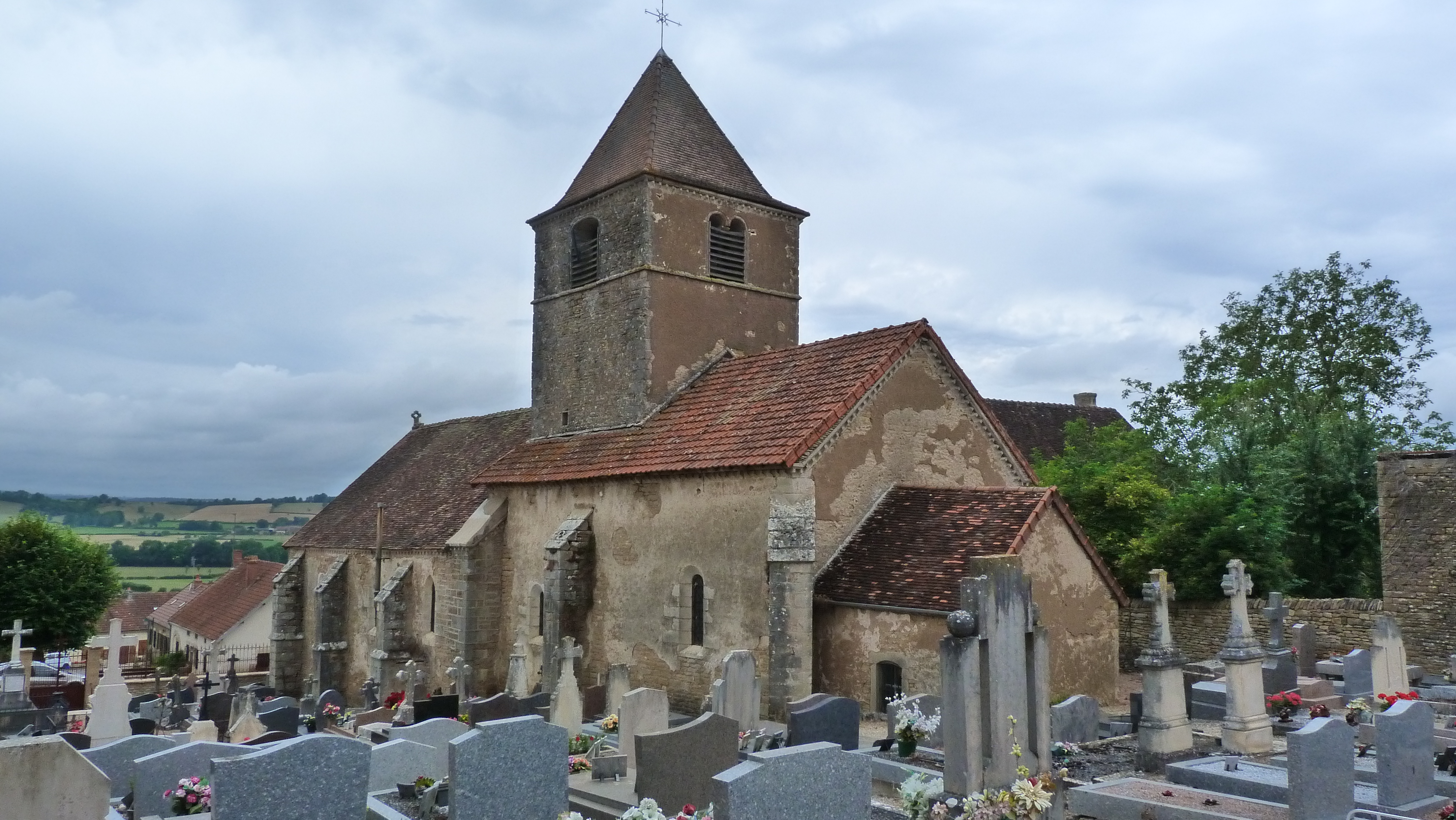 Preĝejo Sankta Germain en Marcilly